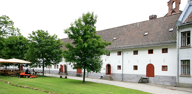 Store provianthus, Akershus festning, Oslo. Bugd ca. 1690.